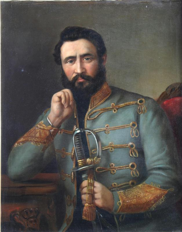 Ormai Norbert honvéd ezredes, az 1848–49-es szabadságharc vértanúja.